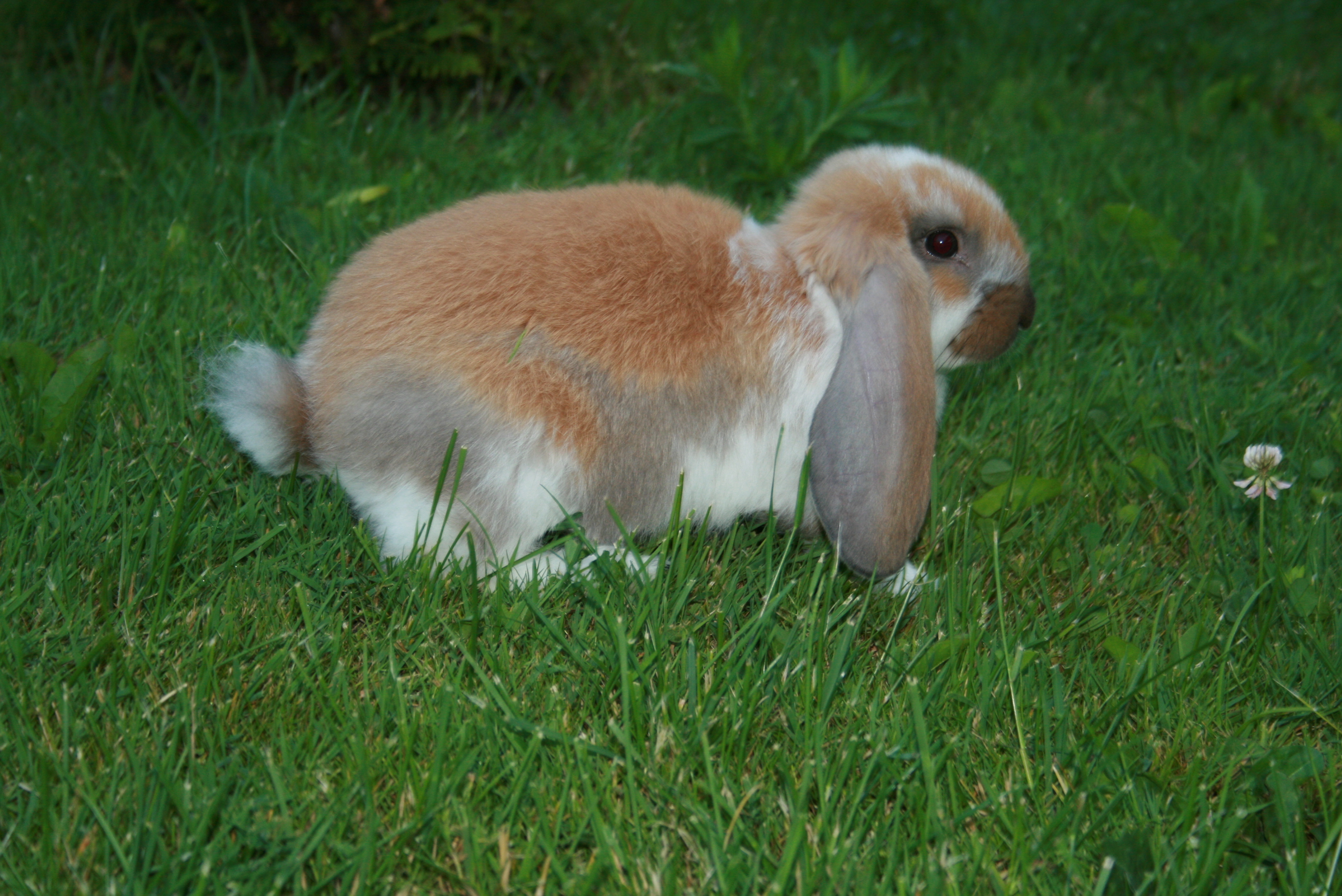 Francuski Baran Madagaskarowy Srokacz -królik w wieku 8 tygodni, Wadą jest zbyt duża ilość białego włosa na karku